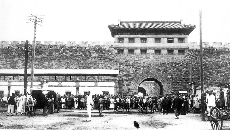 北京正阳门瓮城东闸楼，1915年拆除 《北京的城墙和城门》 1910年